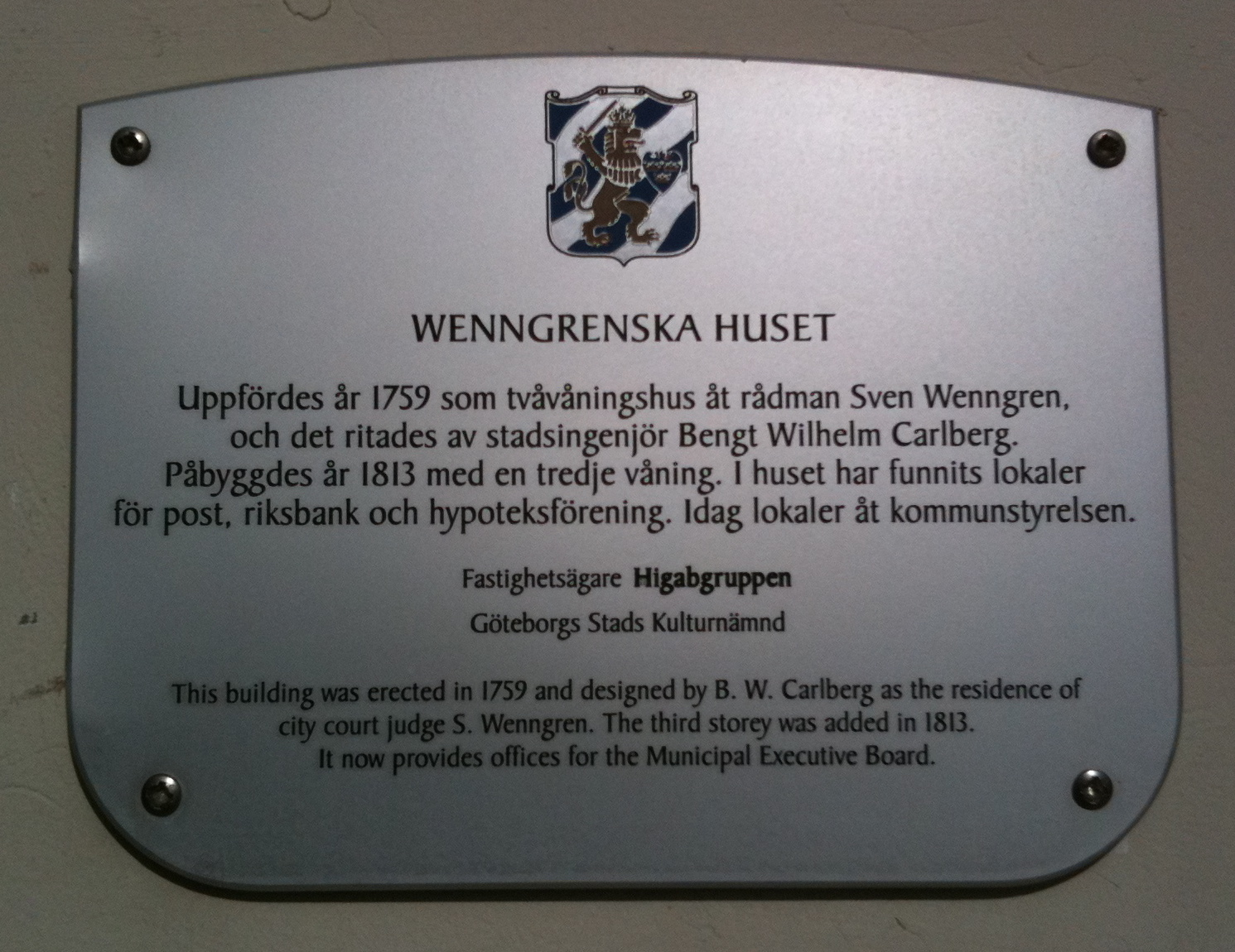 Wennergrenska Huset, Nordstaden 16:2 Hus 1c, Göteborg. Plaketten sattes upp som en del av Göteborgs stads kulturnämnds "Projekt Husmärkning" kring åren 2000-2001 där drygt hundra skyltar ingick. Se även boken "100 utmärkta hus i Göteborg". Vid en inventering av kommunen gjord 2016 satt 69 skyltar fortfarande uppe.